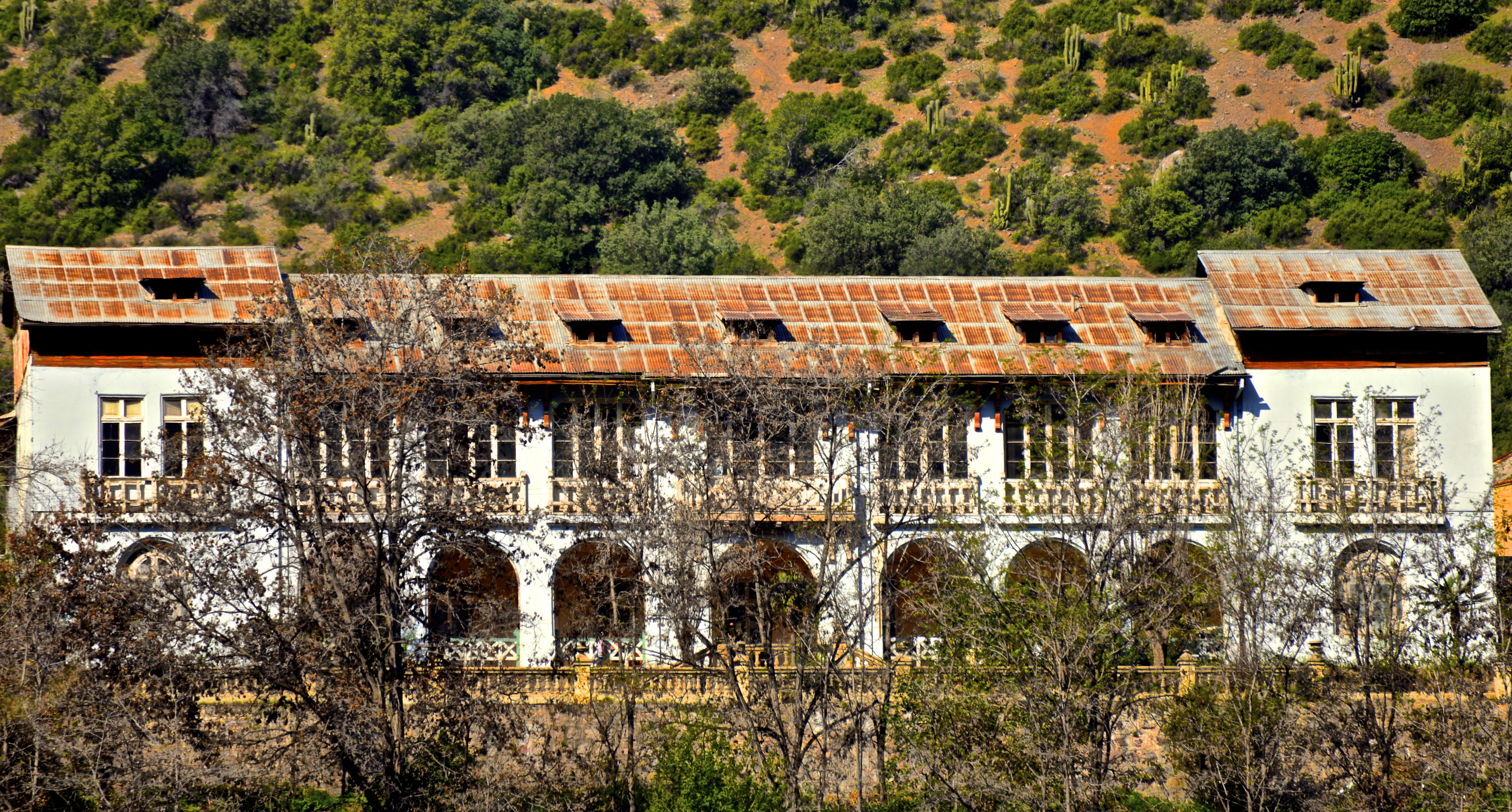 Casa de Salud de Mujeres Carolina Deursther This is a photo of a national monument in Chile: 1854